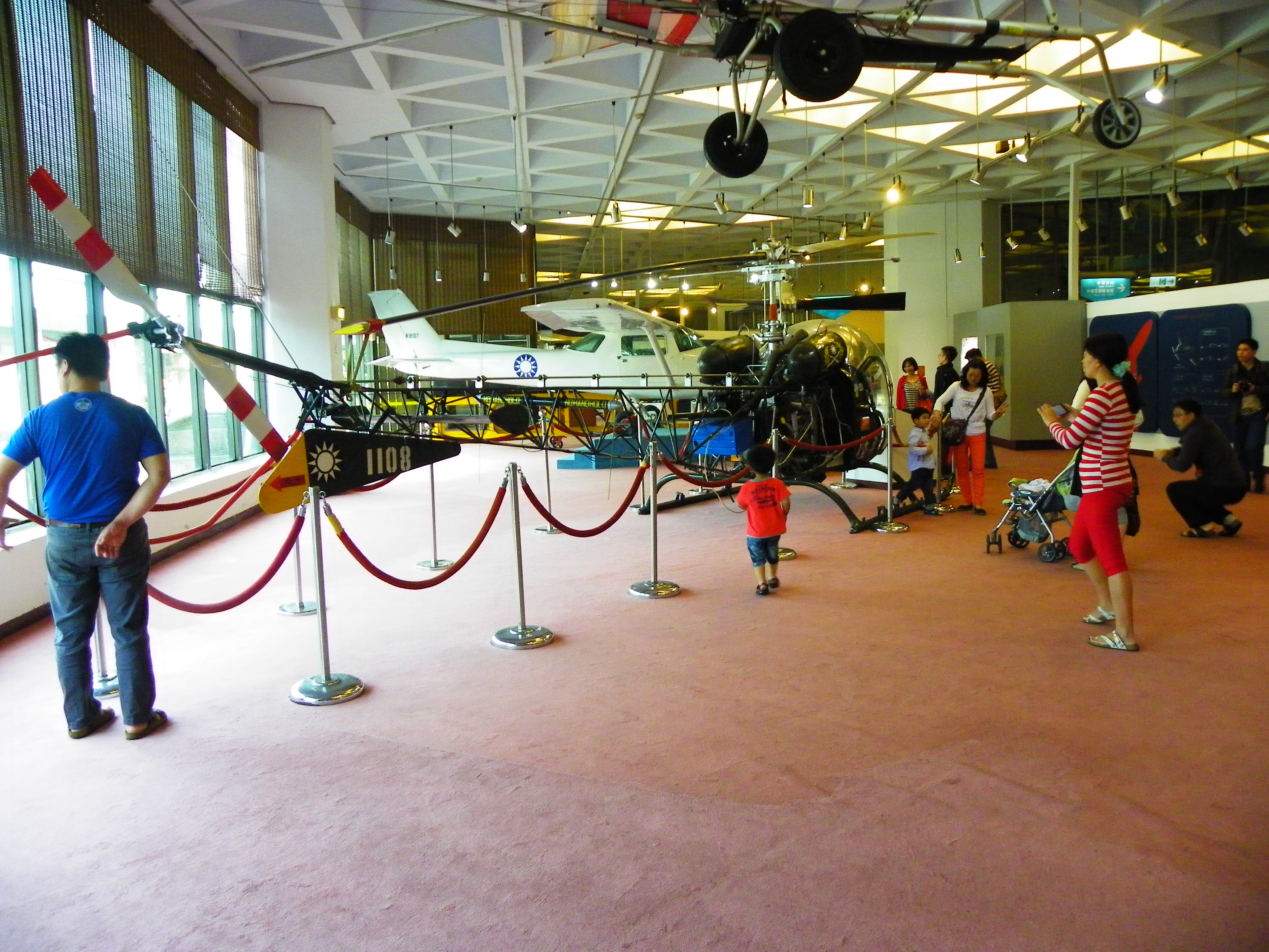 航空科學館飛行工藝區陸軍OH-13H 1108直升機附近的遊客。